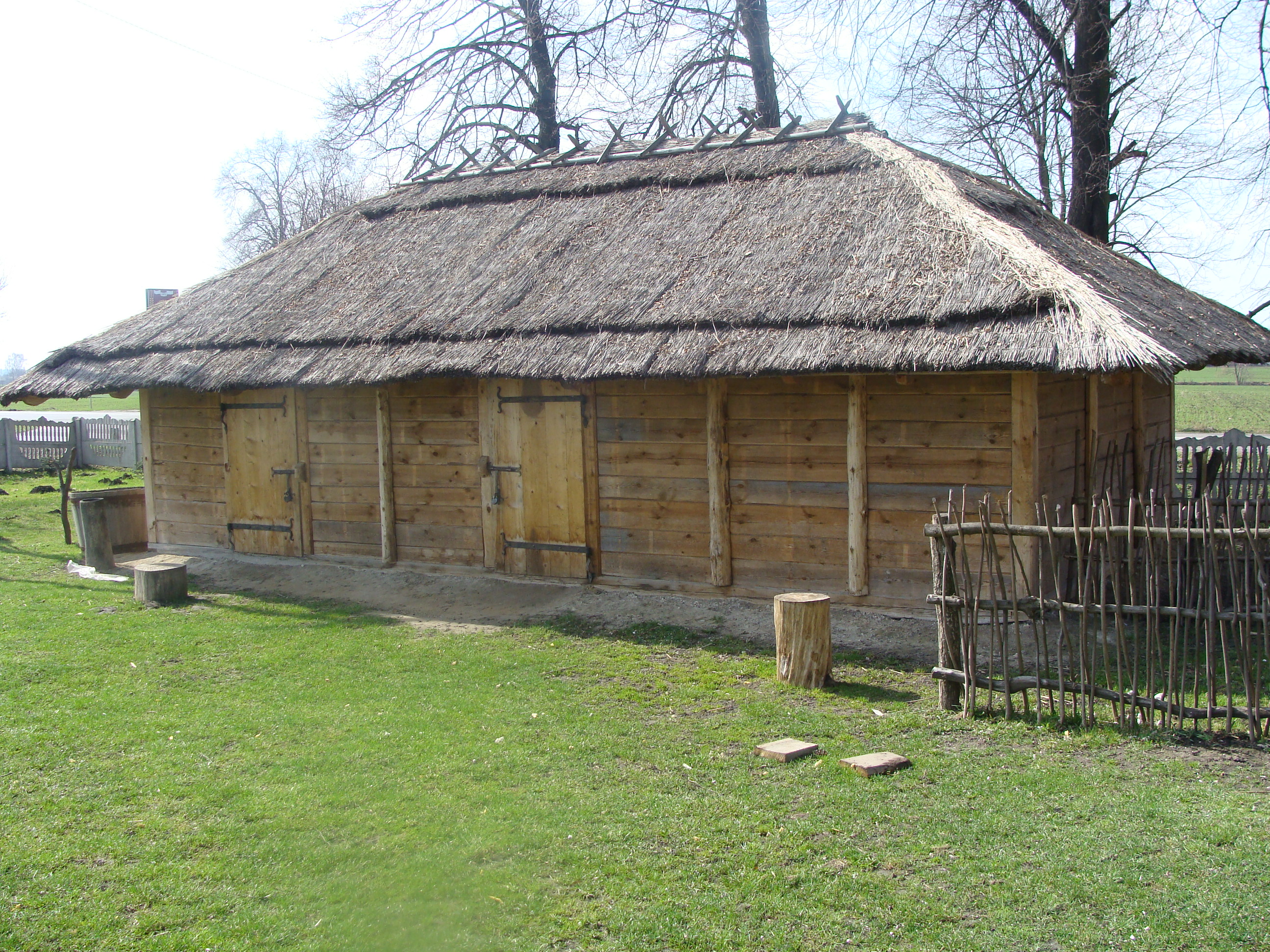 Rekonstrukcja gockiej chaty w Masłomęczu (obok domu kultury)